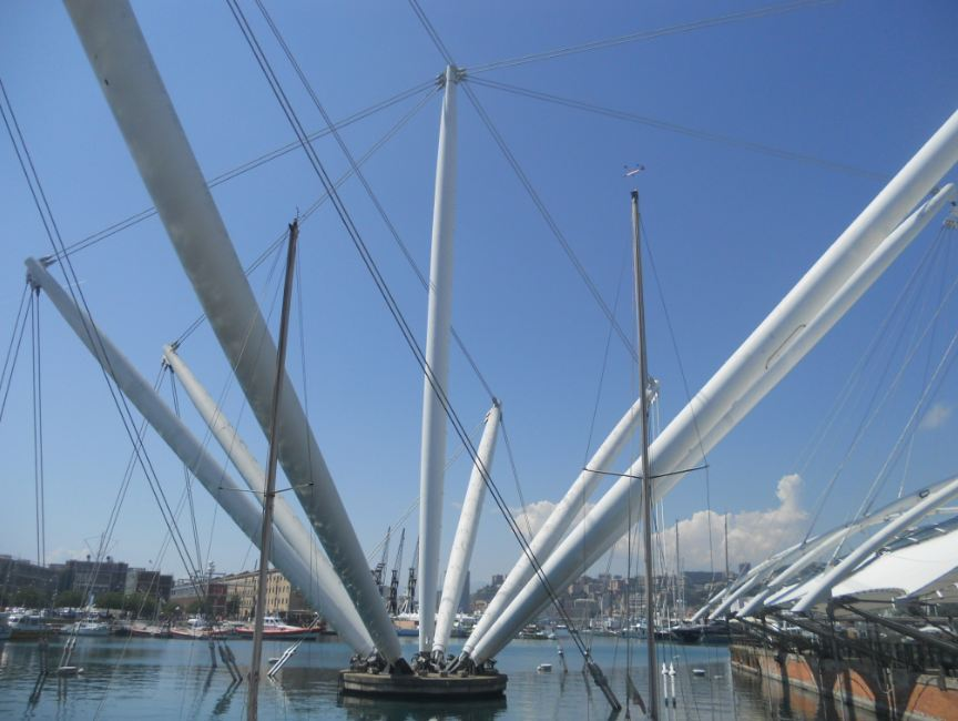 Bigo.